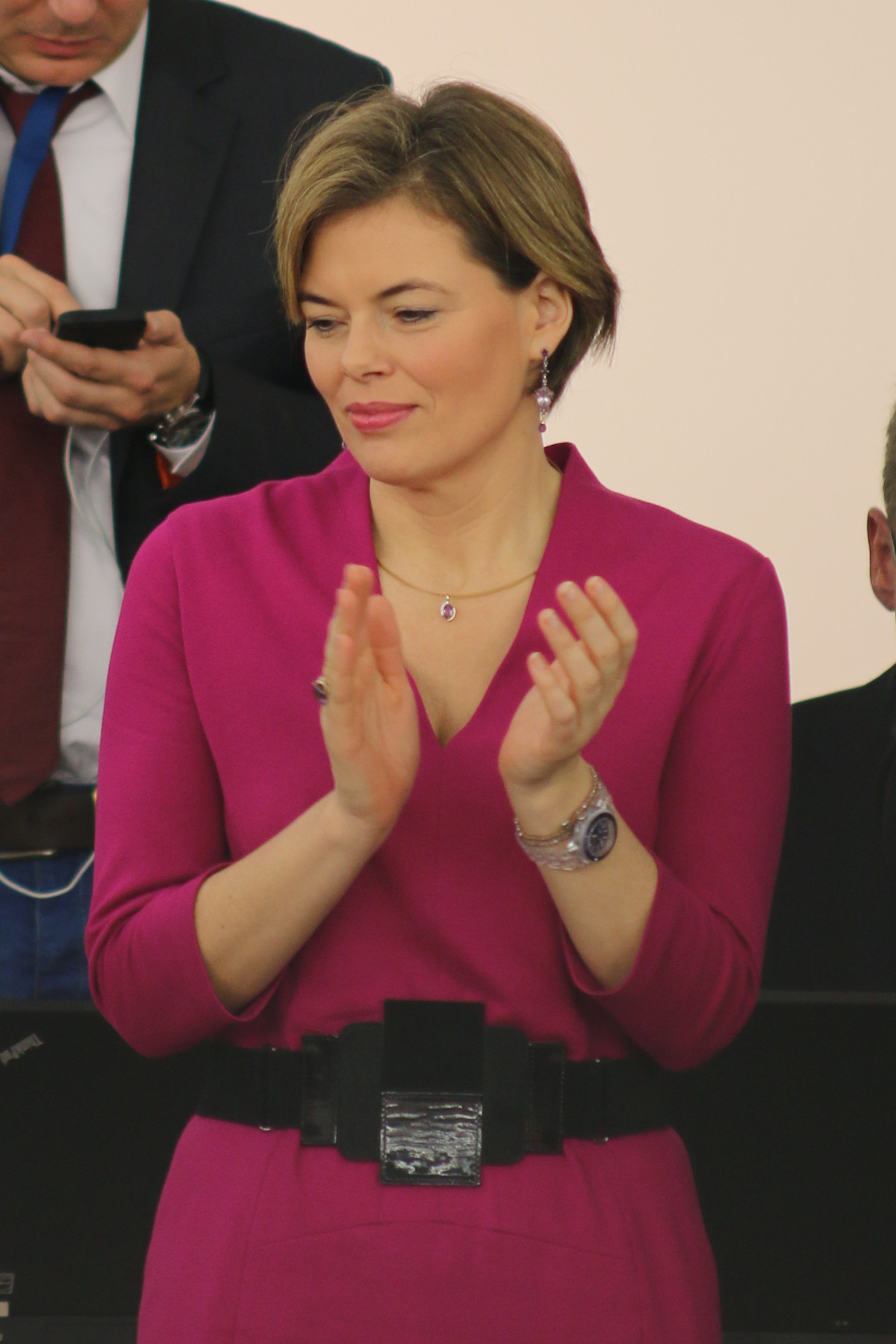 Konstituierende Sitzung des Hessischen Landtags 2014: Julia Klöckner, CDU Vorsitzende von Rheinland-Pfalz